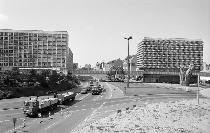 11.-18.8.1991 Bundesland Sachsen-Anhalt Halle, Zentrum